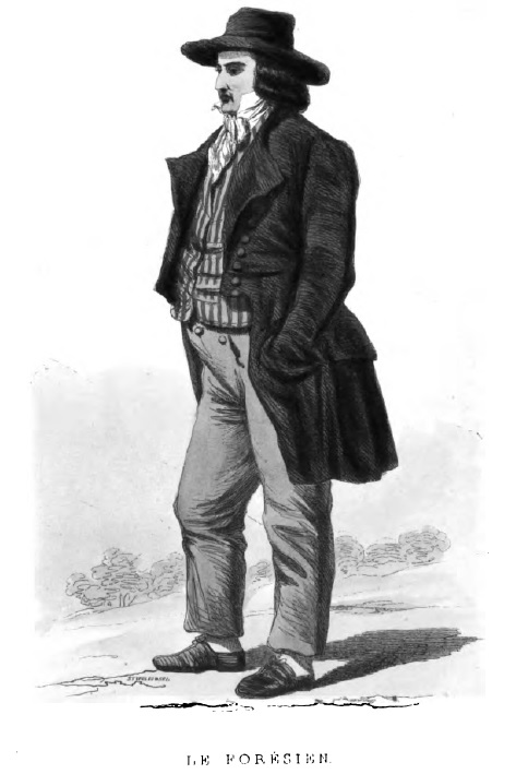 Le Forésien.